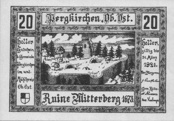 Motiv "Burgruine Mitterberg" auf einem Notgeldschein der Gemeinde Pergkirchen